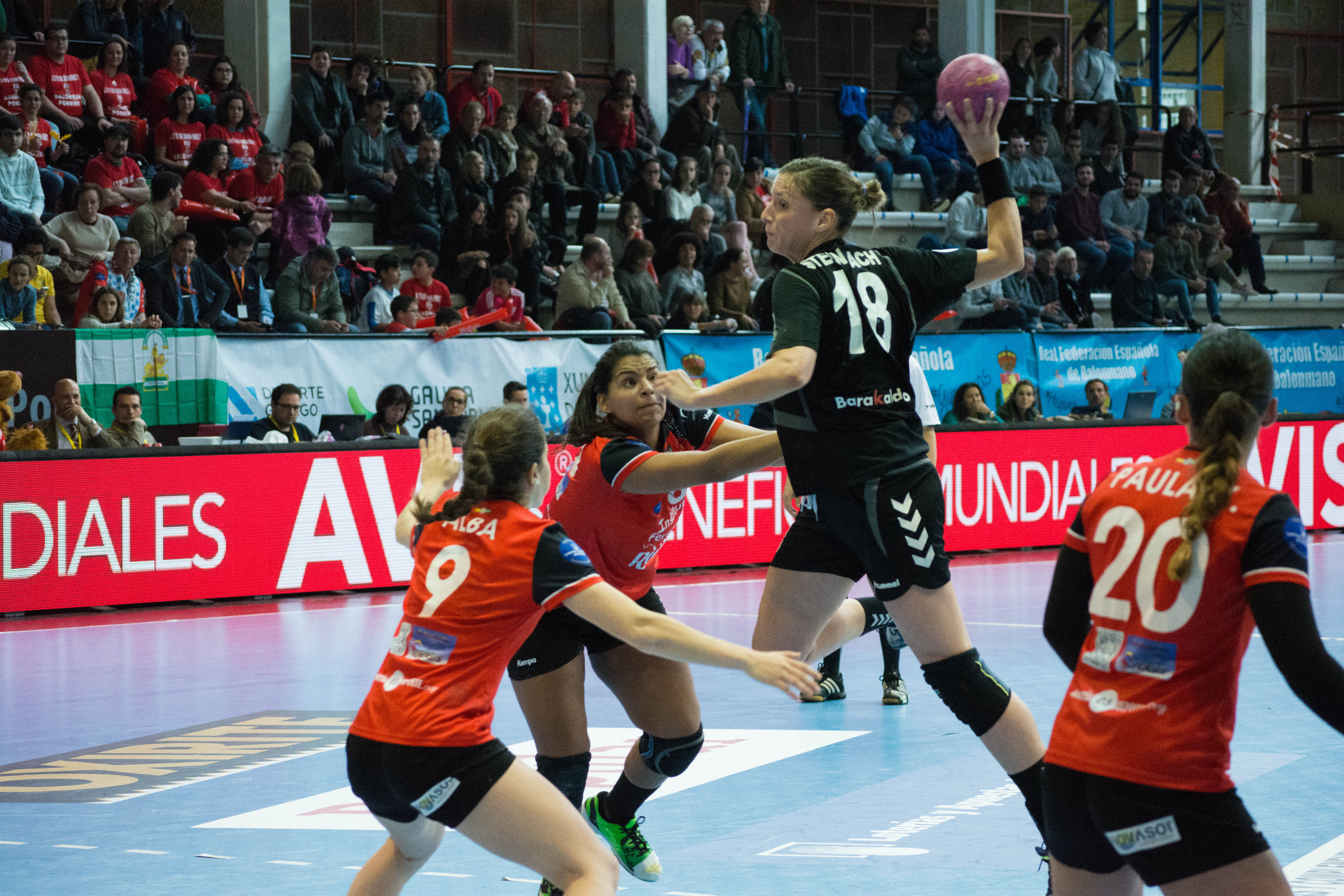 Partido que enfrenta en la Copa de la Reina de Balonmano 2016 al Zuazo y Clínicas Rincón Málaga